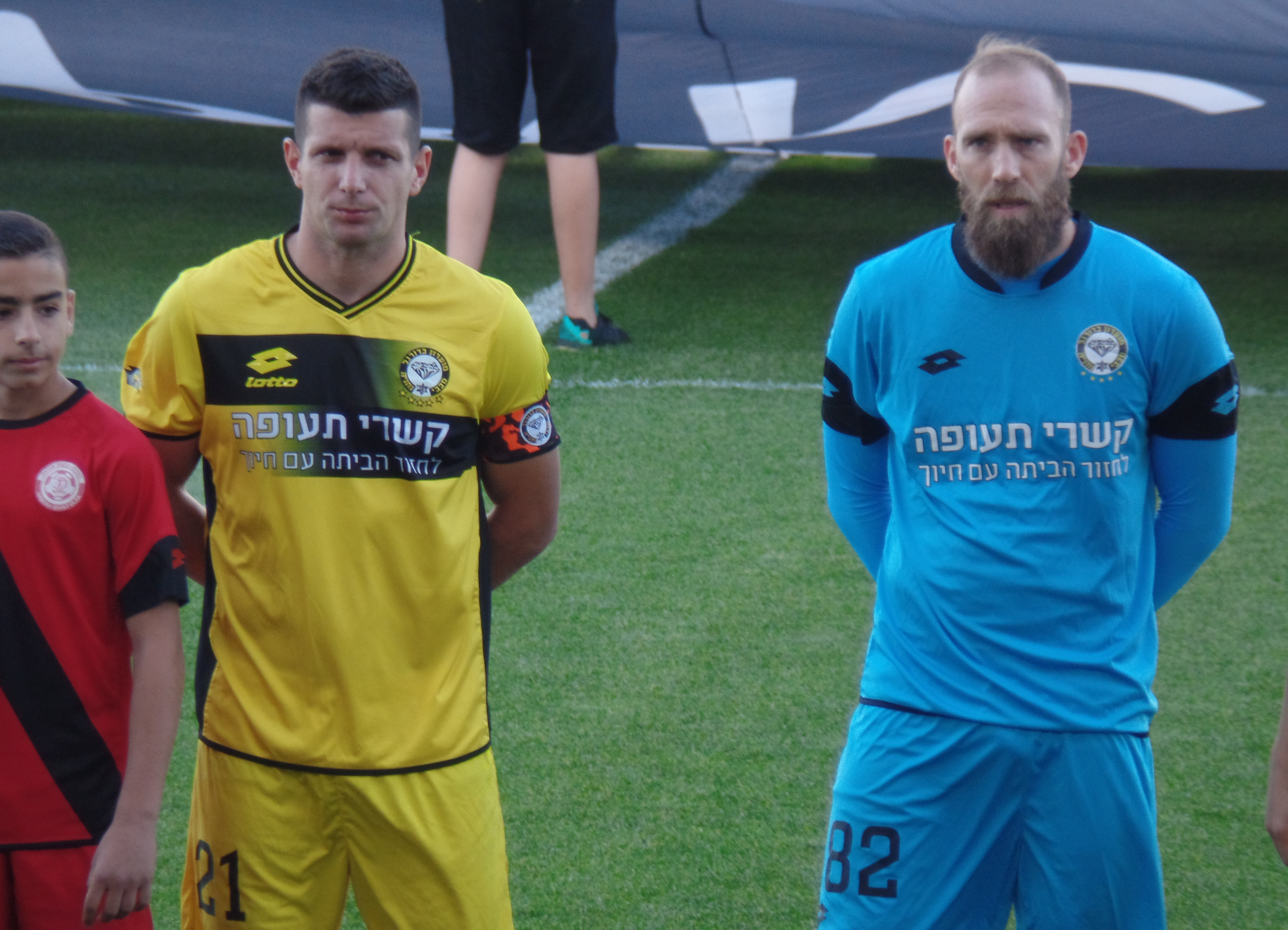 דני עמוס ופאטוס בצ'יראי במדי מכבי נתניה, 2019